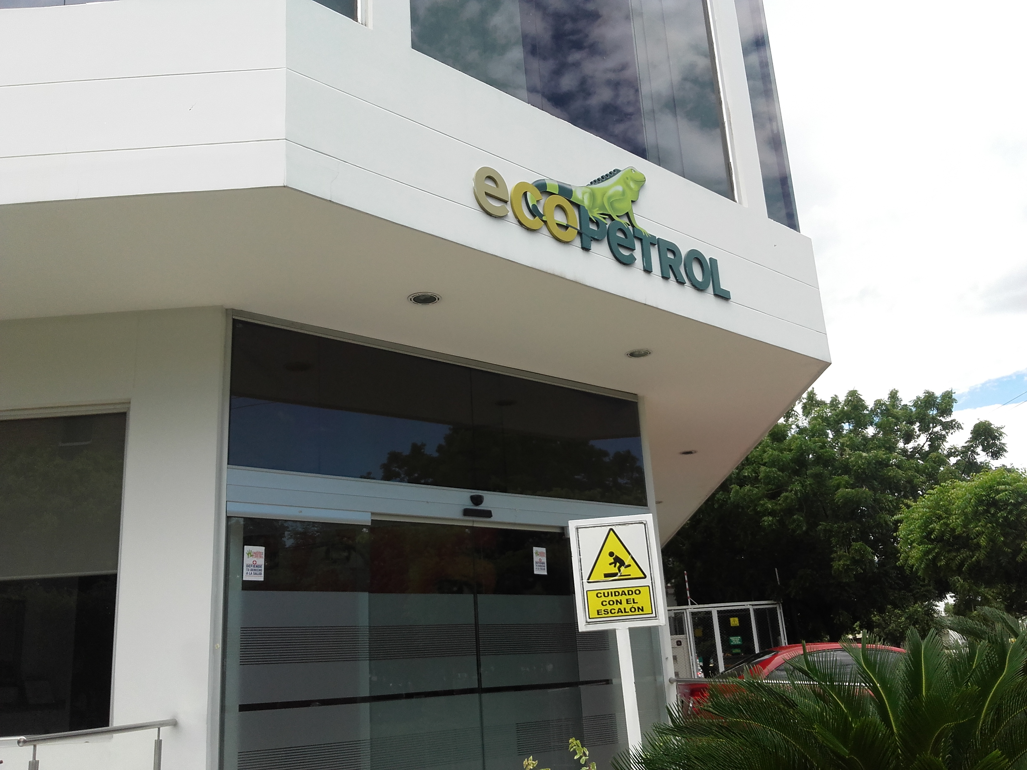 entradassd